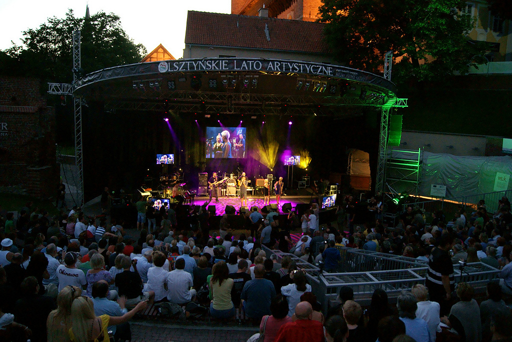 XIX Olsztyńskie Noce Bluesowe - dzień pierwszy